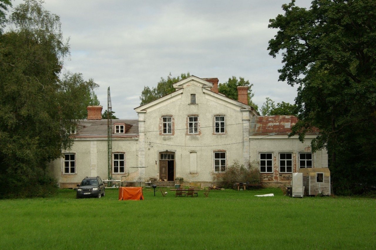 Pikva mõis asub Harjumaal Anija vallas Pikva külas